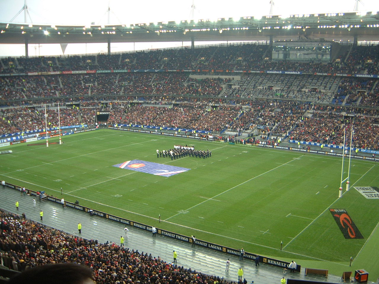 France-Angleterre Tournoi des VI Nations 02-03-2002